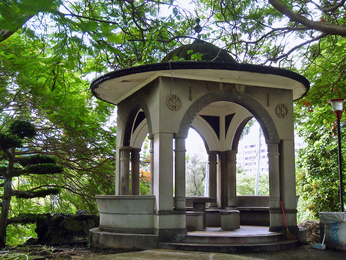 砲台山上望月亭。